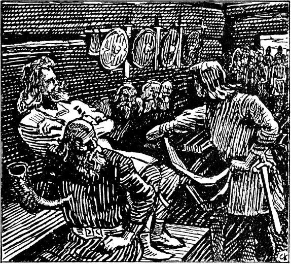 Christian Krogh: Illustration for Olav Tryggvasons saga, Heimskringla 1899-edition. nn: «Geirmund seier Håkon jarl tidend om Jomsvikingene.» nb: «Geirmund bringer Håkon jarl bud om jomsvikingene.»